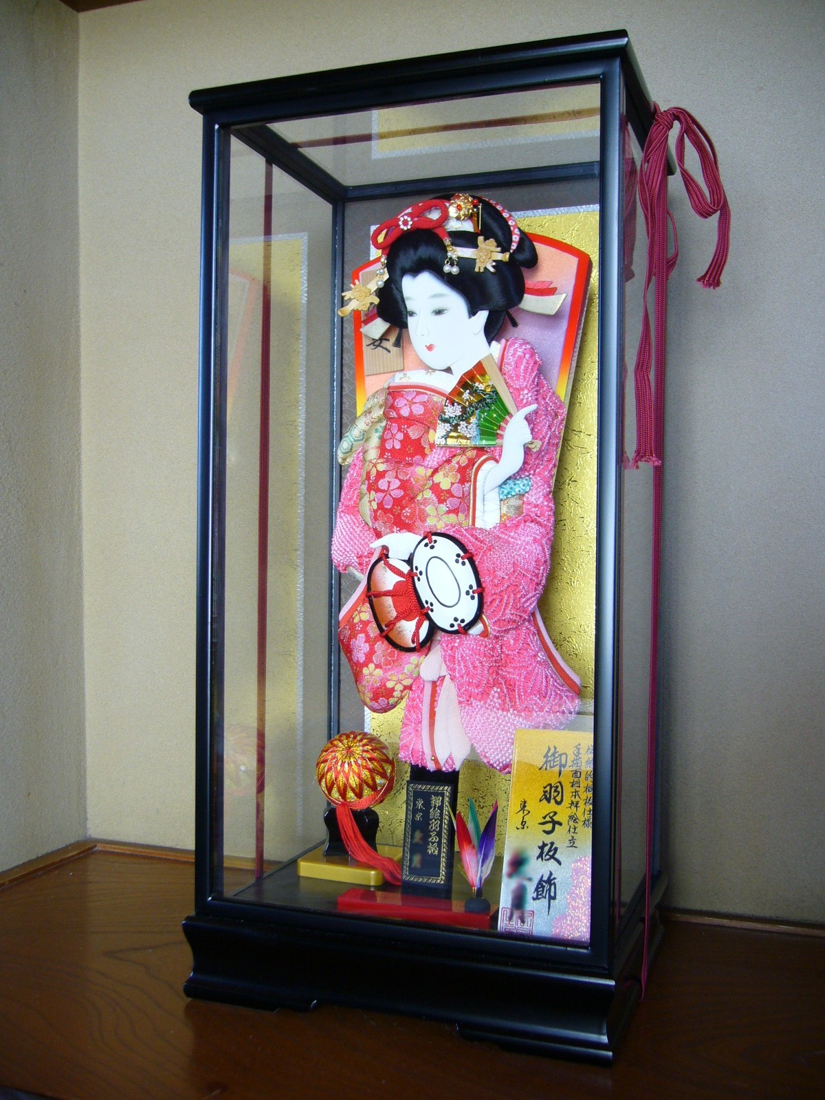 Battledore decoration,hagoita,japan